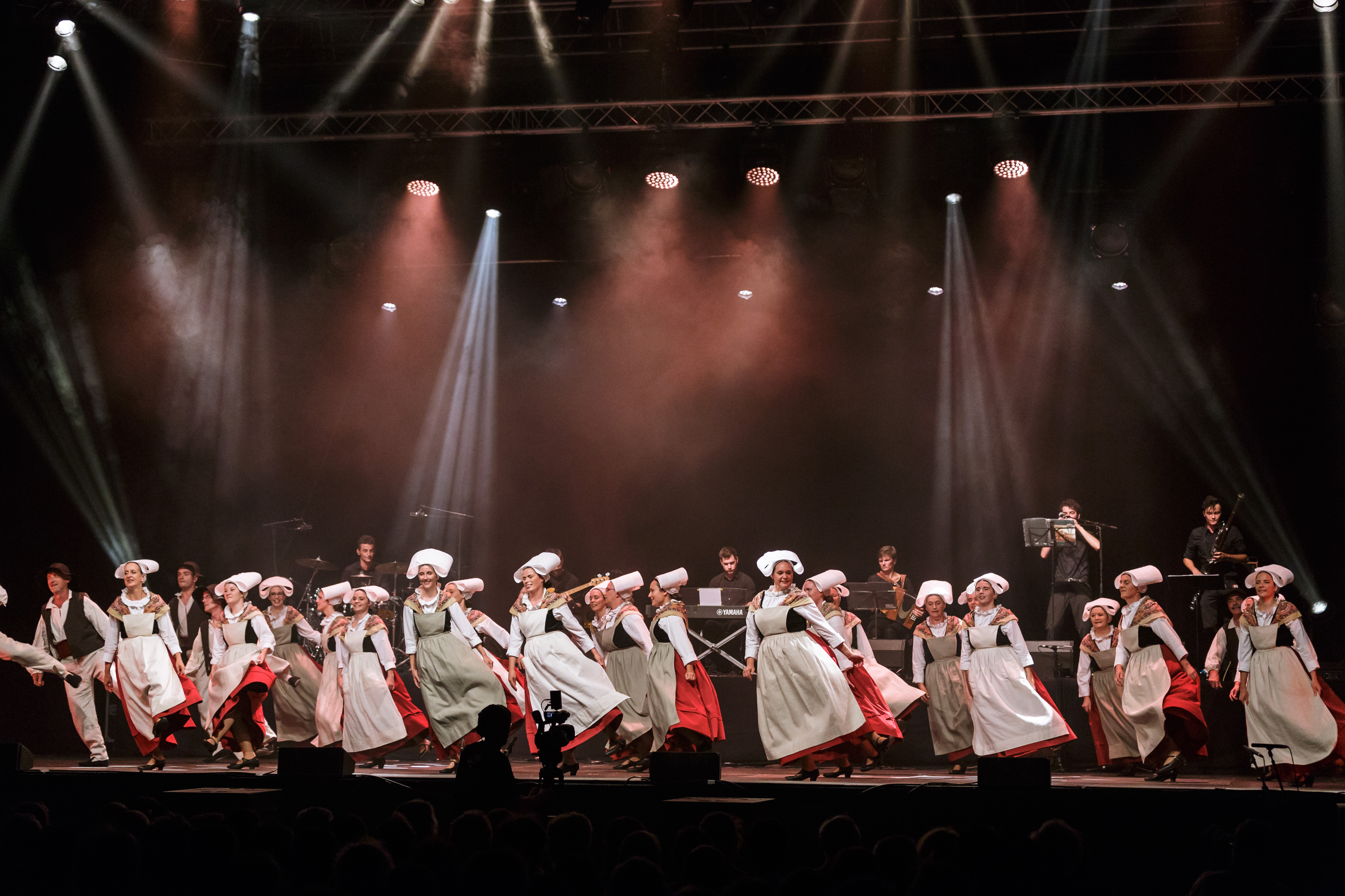 Le cercle Les Perrières de Cesson-Sévigné lors du spectacle Kement Tu, organisé par la confédération de danse War’l Leur dans le cadre du Championnat de Bretagne au Pavillon de Penvillers à Quimper le 22 juillet 2017.